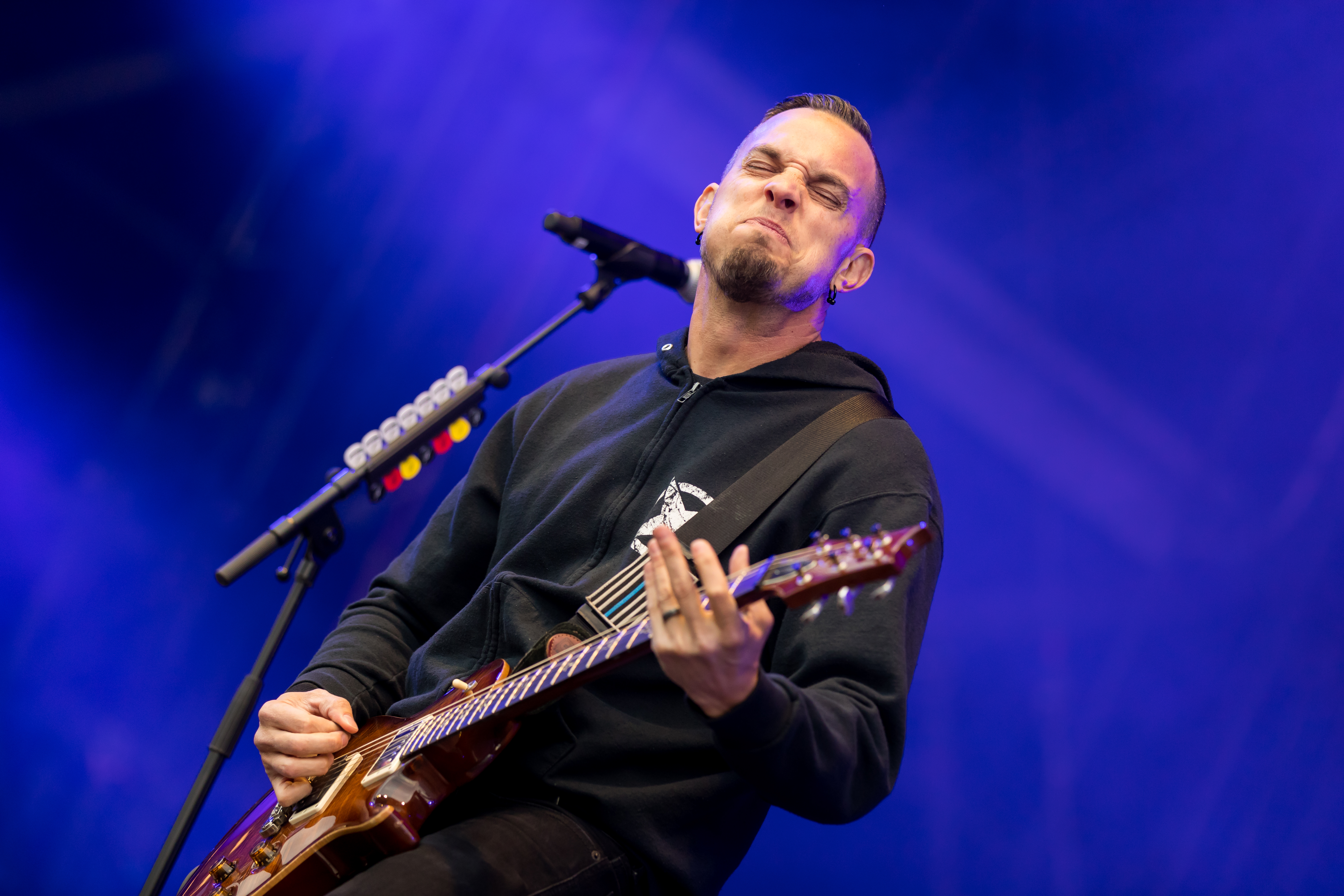 Alter Bridge during Rock am Ring at Nürburgring, Nürburg, Rheinland Pfalz, Germany on 2017-06-04, Photo: Sven Mandel